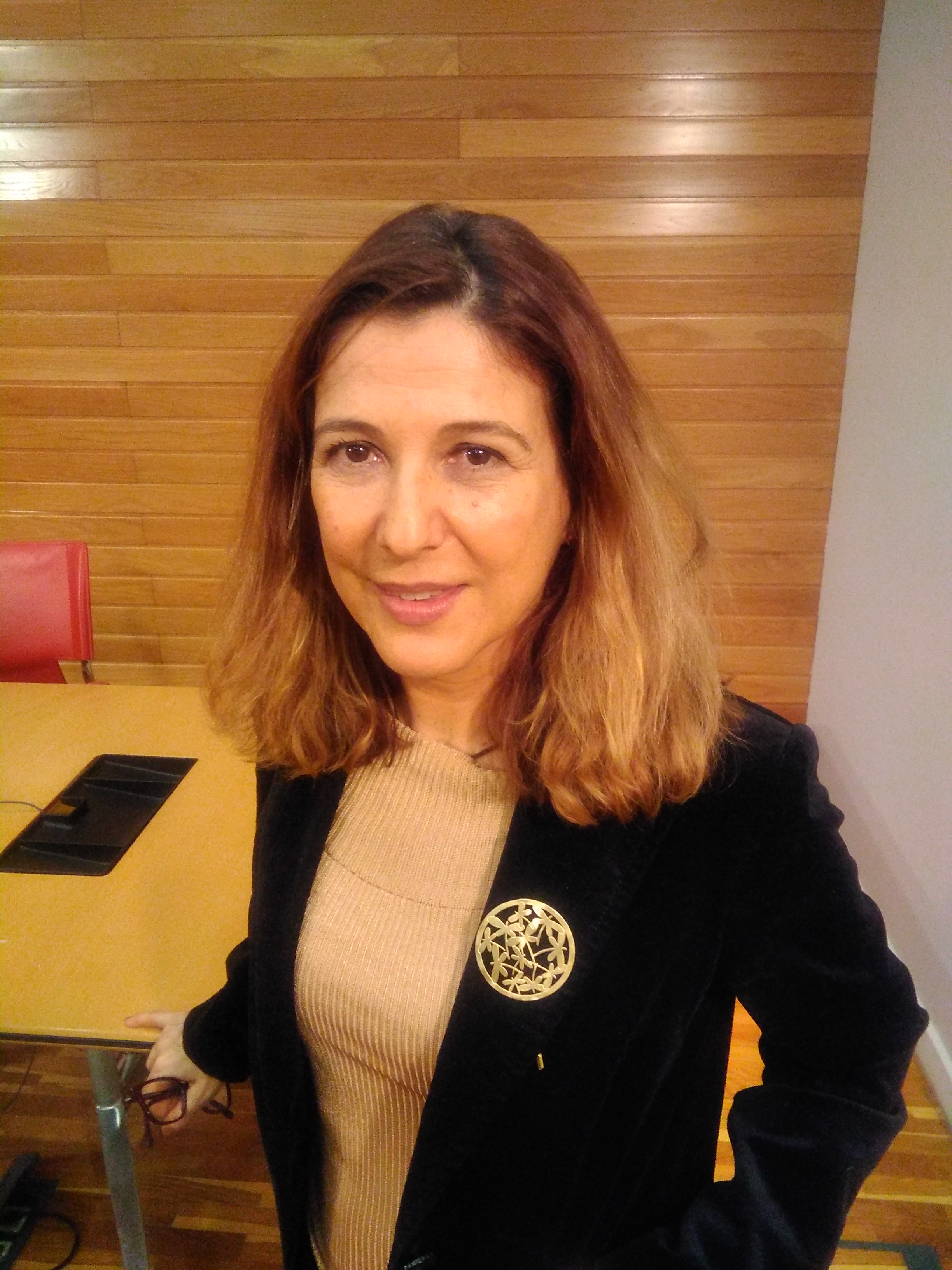 Ana Romero